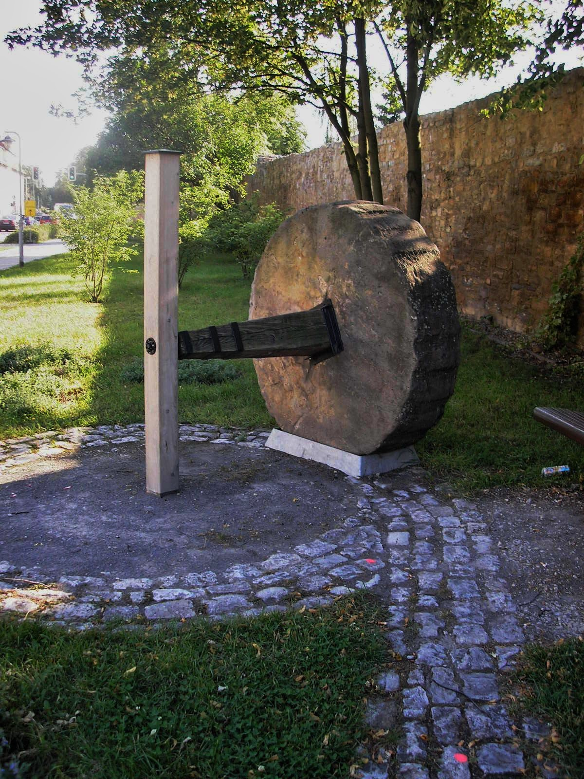 Ein Waidstein in Sömmerda (Thüringen). Mit derartigen Steinen wurde Färberwaid zerkleinert.